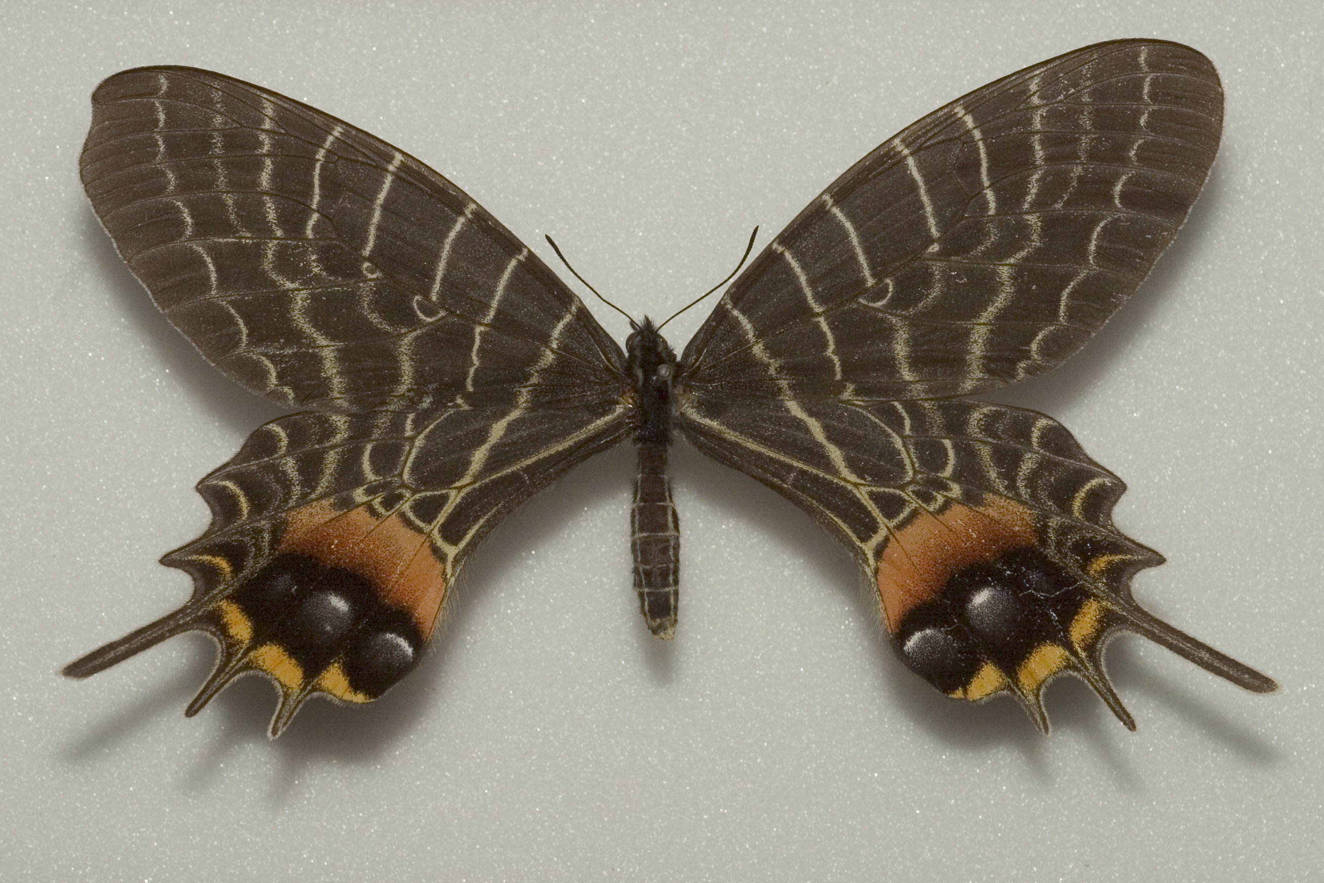 Bhutanitis lidderdalii, Bhutan, India